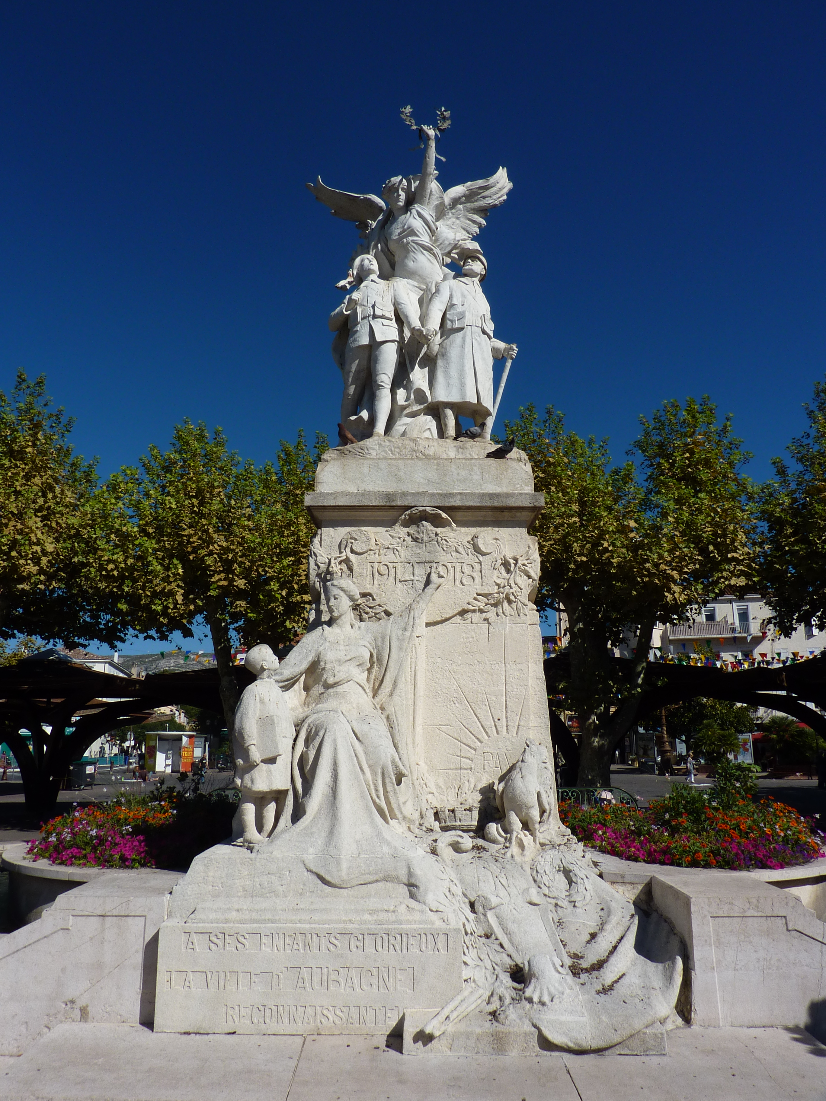 Monument aux morts (Inscrit) .